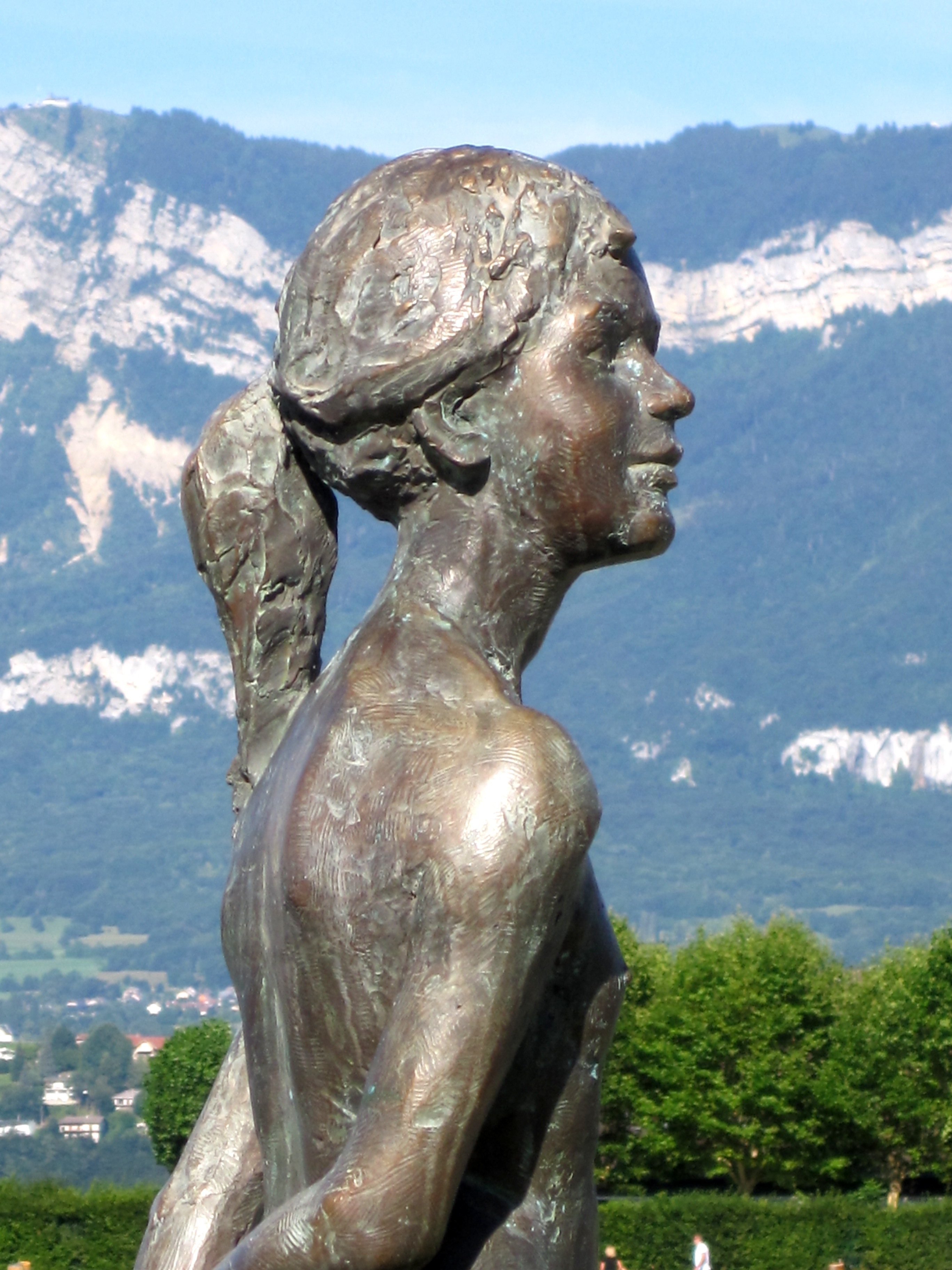 Zwillingsschwestern in Moos-Iznang und Le Bourget du Lac von Friedhelm Zilly, jeweils an der Uferpromenade; Symbol der Partnerschaft der beiden Gemeinden